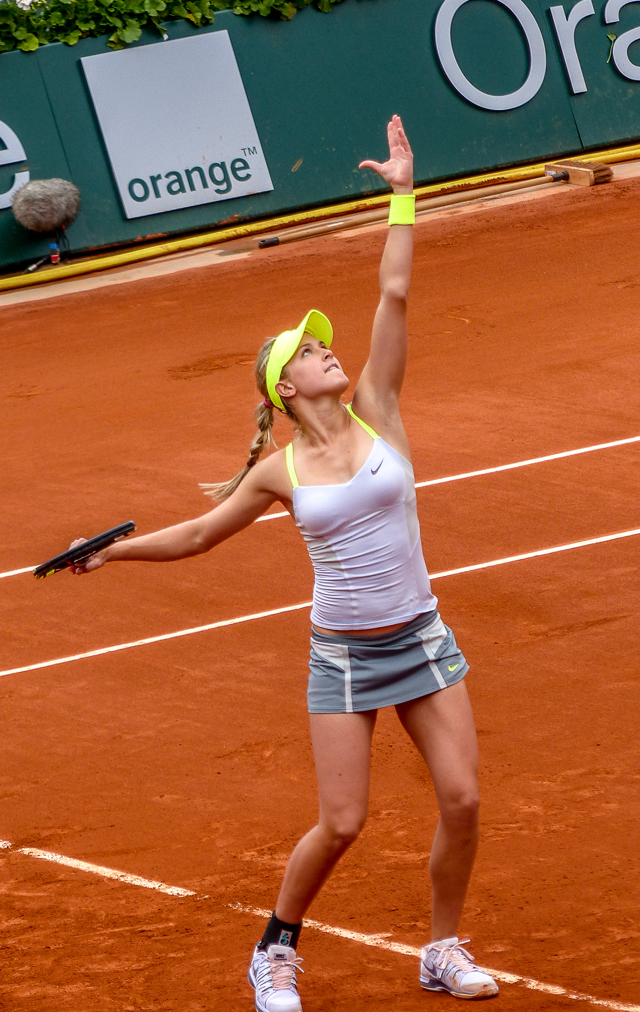 2ème tour Roland Garros 2013 : Maria Sharapova (RUS) vs Eugenie Bouchard (CAN)